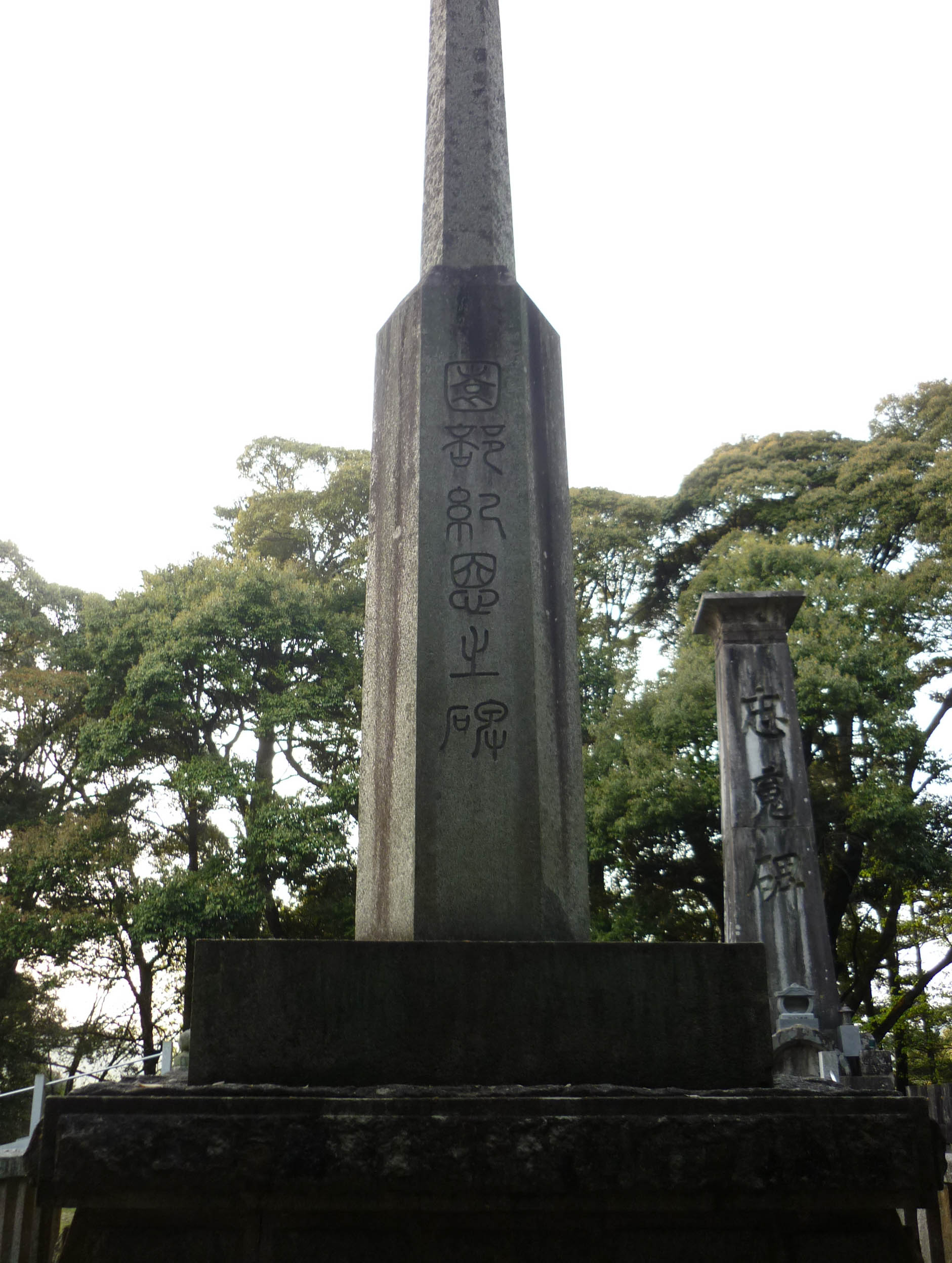 塔